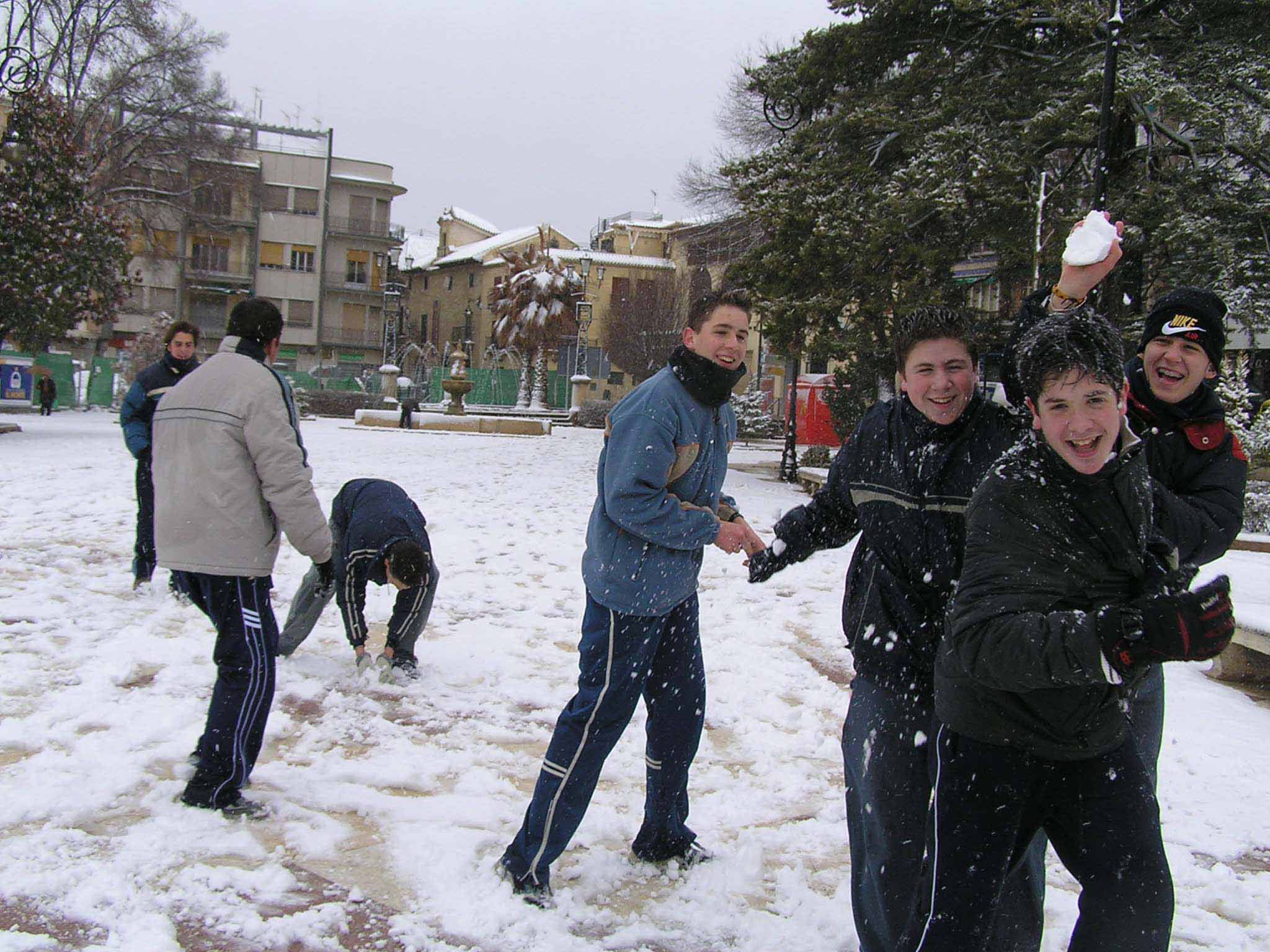 Nevada de Alcalá la Real, Jaén (España)